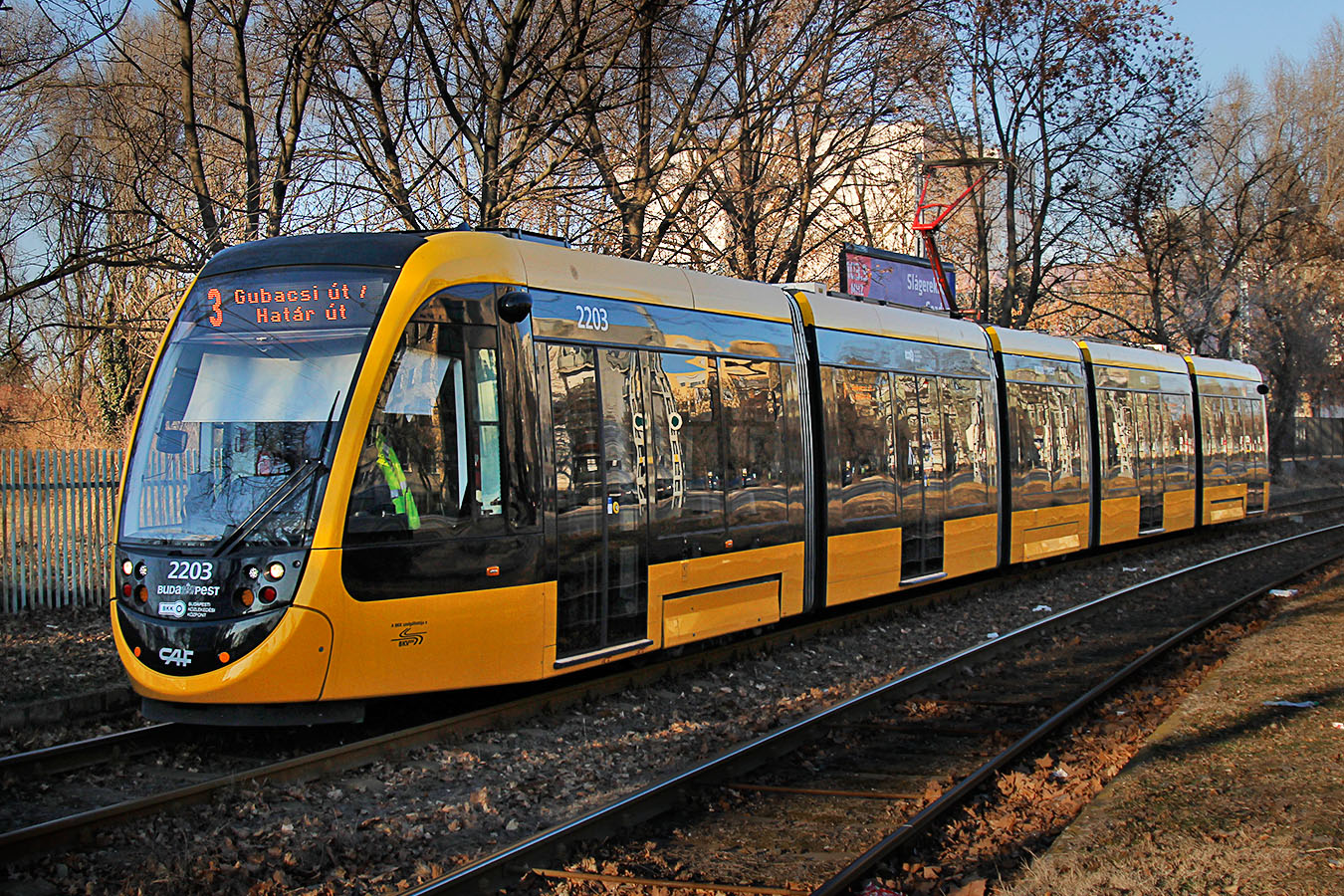 CAF Urbos 3 a 3-as villamos vonalán 2017-ben